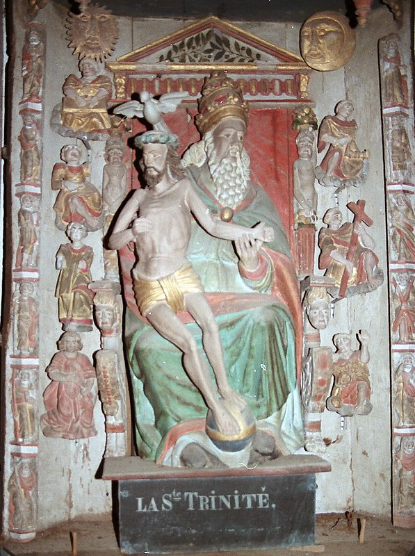 église la Feuillée, retable, denez goasguen.